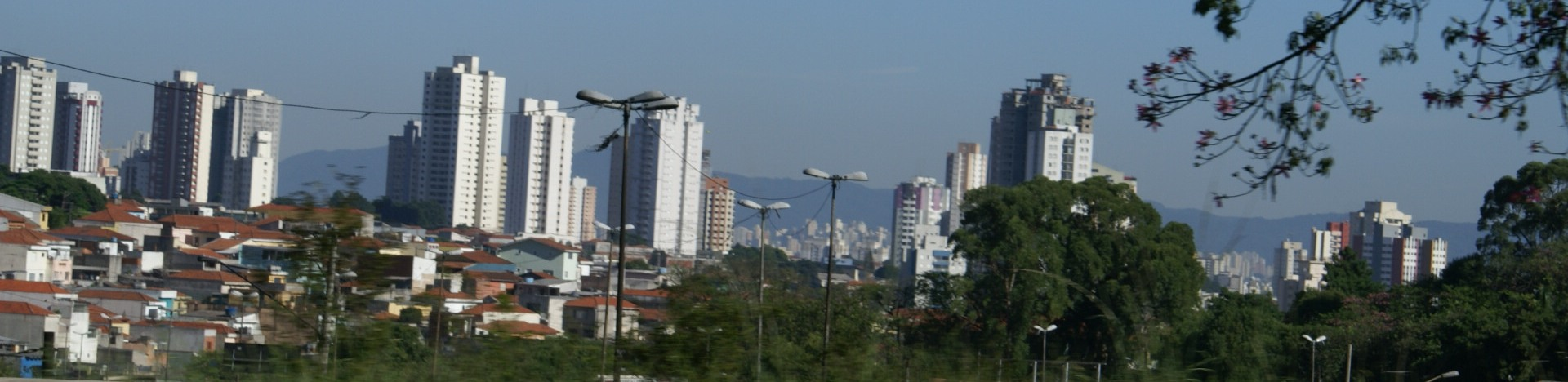 Bairro Alto da Mooca em São Paulo. - Alto da Mooca neighborhoods in São Paulo City.